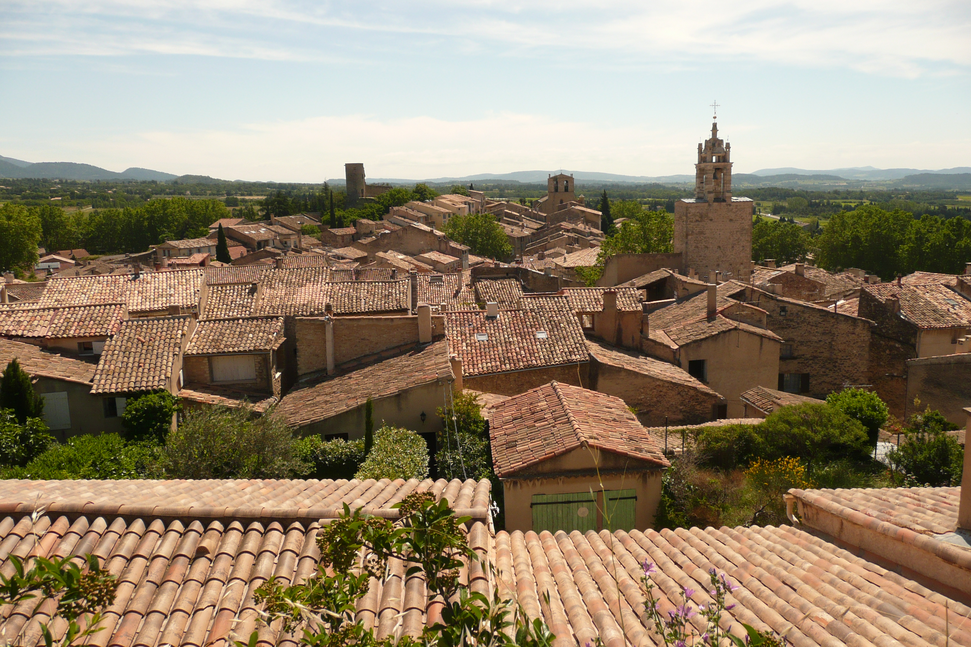 Vue d'ensemble du village de Cucuron (Vaucluse, France).